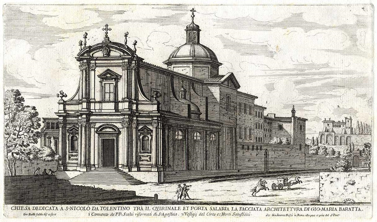 Incisione di Falda